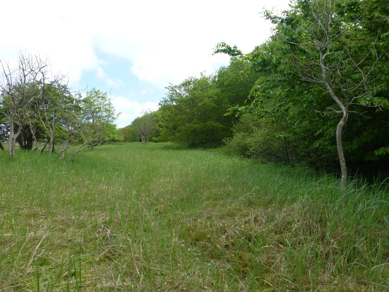 Naturschutzgebiet „Bewaldete Binnendüne bei Noer“, Graudünenbereich (Fotografiert mit Betretungserlaubnis für das Naturschutzgebiet: 2.6-67.21.09 vom 15.01.2013 Kreis Rendsburg-Eckernförde)